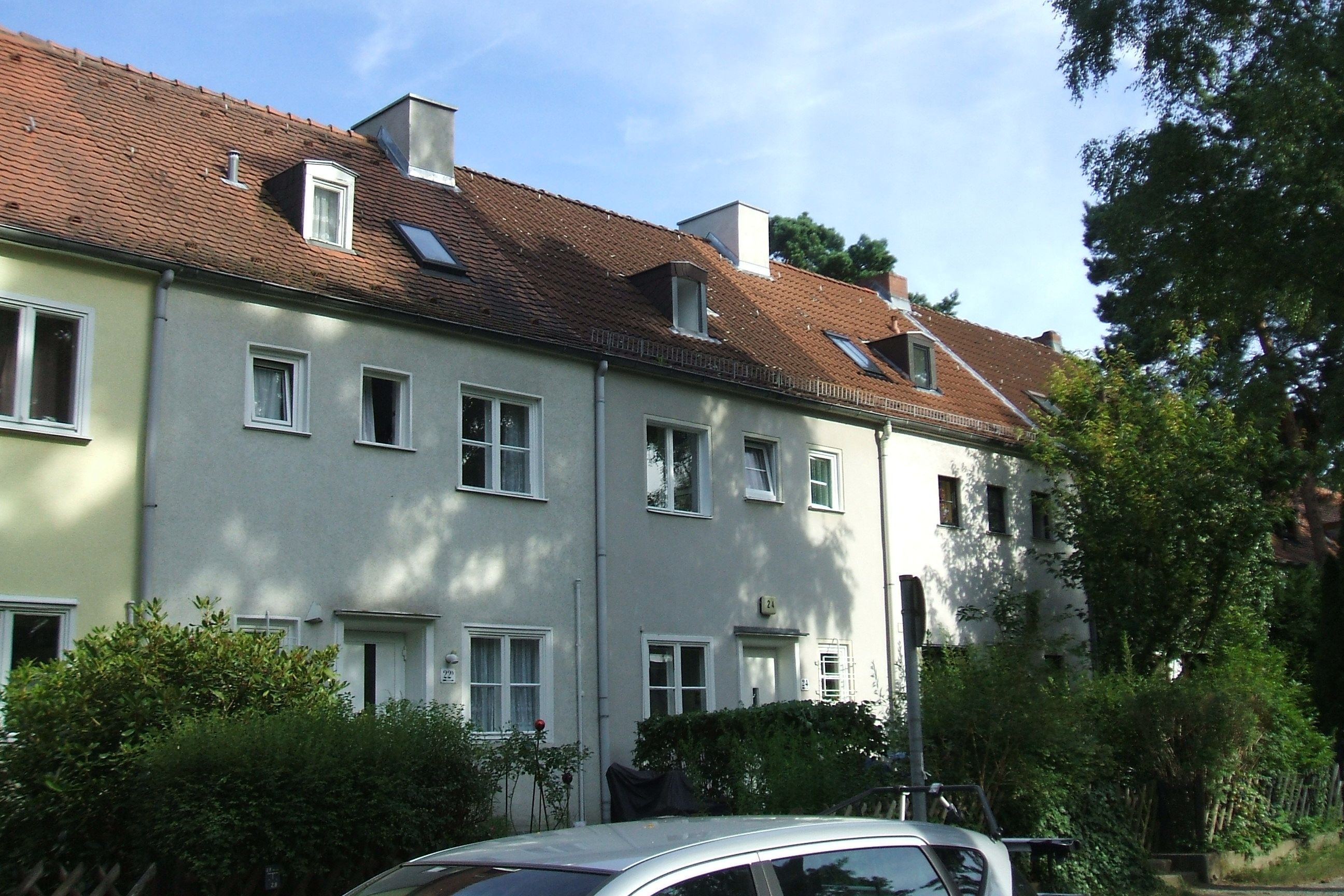 Berlin, Zehlendorf, Haus Am Fischtal 22 und 24 in Berlin Zehlendorf